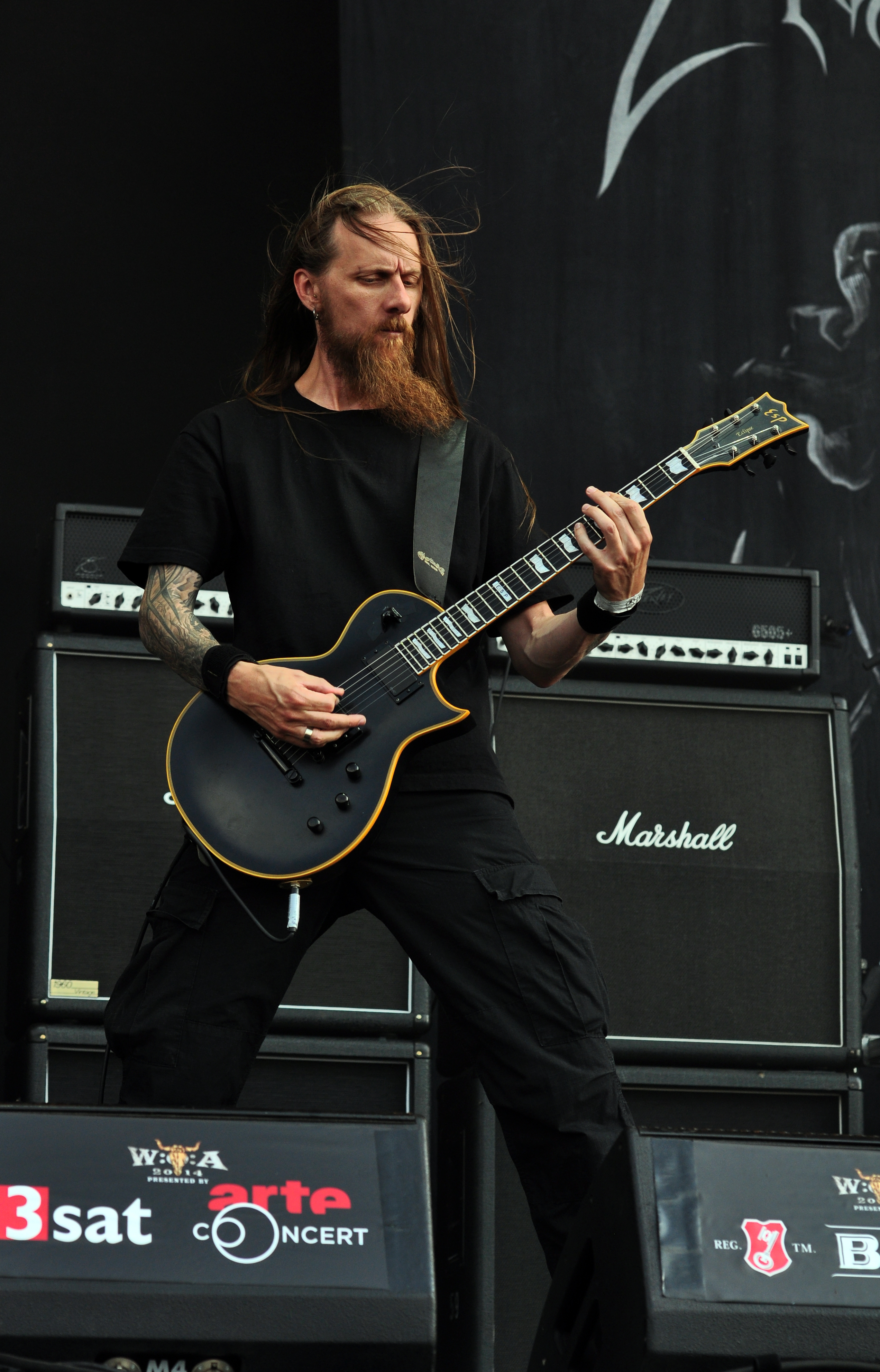 02-08-2014-Tomas „Samoth“ Haugen with Emperor at Wacken Open Air 2014-JonasR 12